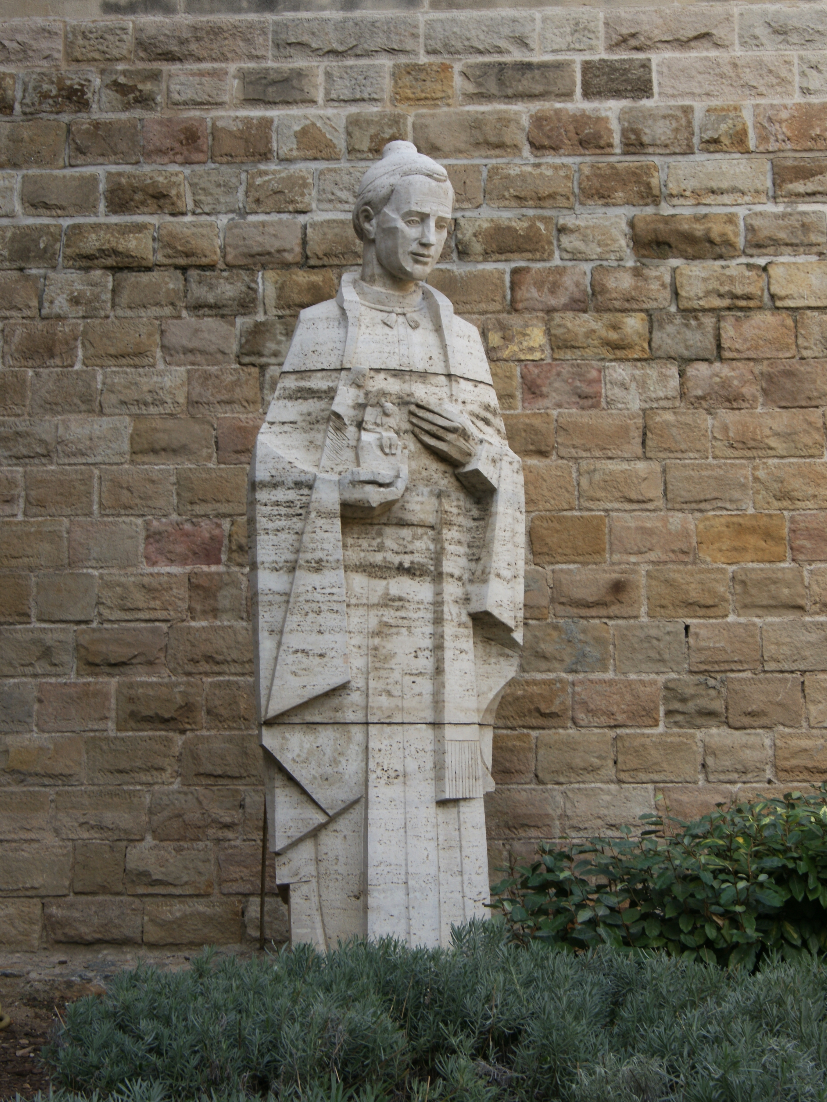 Temple Expiatori de la Sagrada Família (dt.: Sühnekirche der Heiligen Familie) (oft nur Sagrada Família genannt) ist die Bezeichnung einer großen römisch-katholischen Basilika in Barcelona. Die ursprünglich im neukatalanischen Stil, von Antoni Gaudí entworfene Kirche wurde 1882 begonnen, jedoch bis heute nicht vollendet. Der höchste Punkt (das Kreuz) sollte bei 170m liegen.